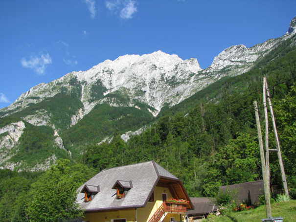 Trentski Pelc iz Trente